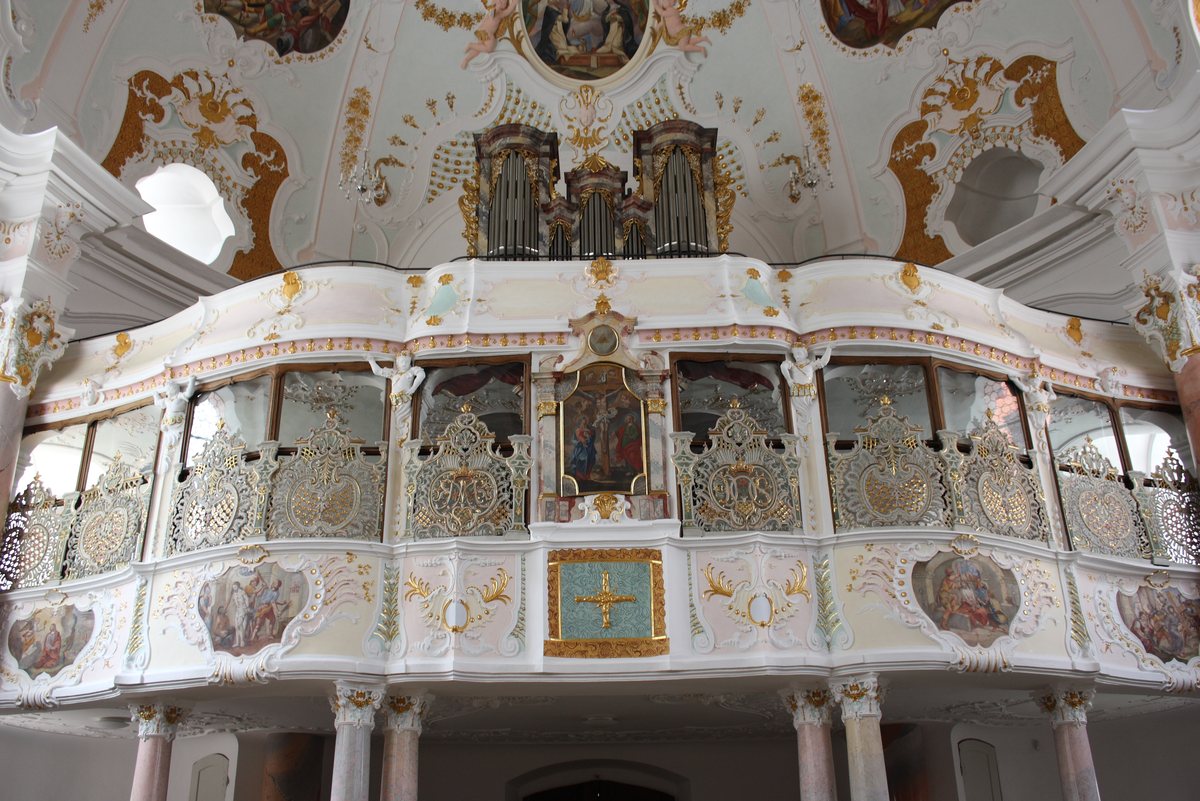 Katholische Kirche Zu Unserer Lieben Frau in Günzburg (Bayern), 1736-1741 von Dominikus Zimmermann gebaut, Orgel und Nonnenchor